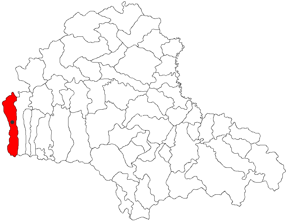 Categorie:Hărţi ale judeţului Braşov